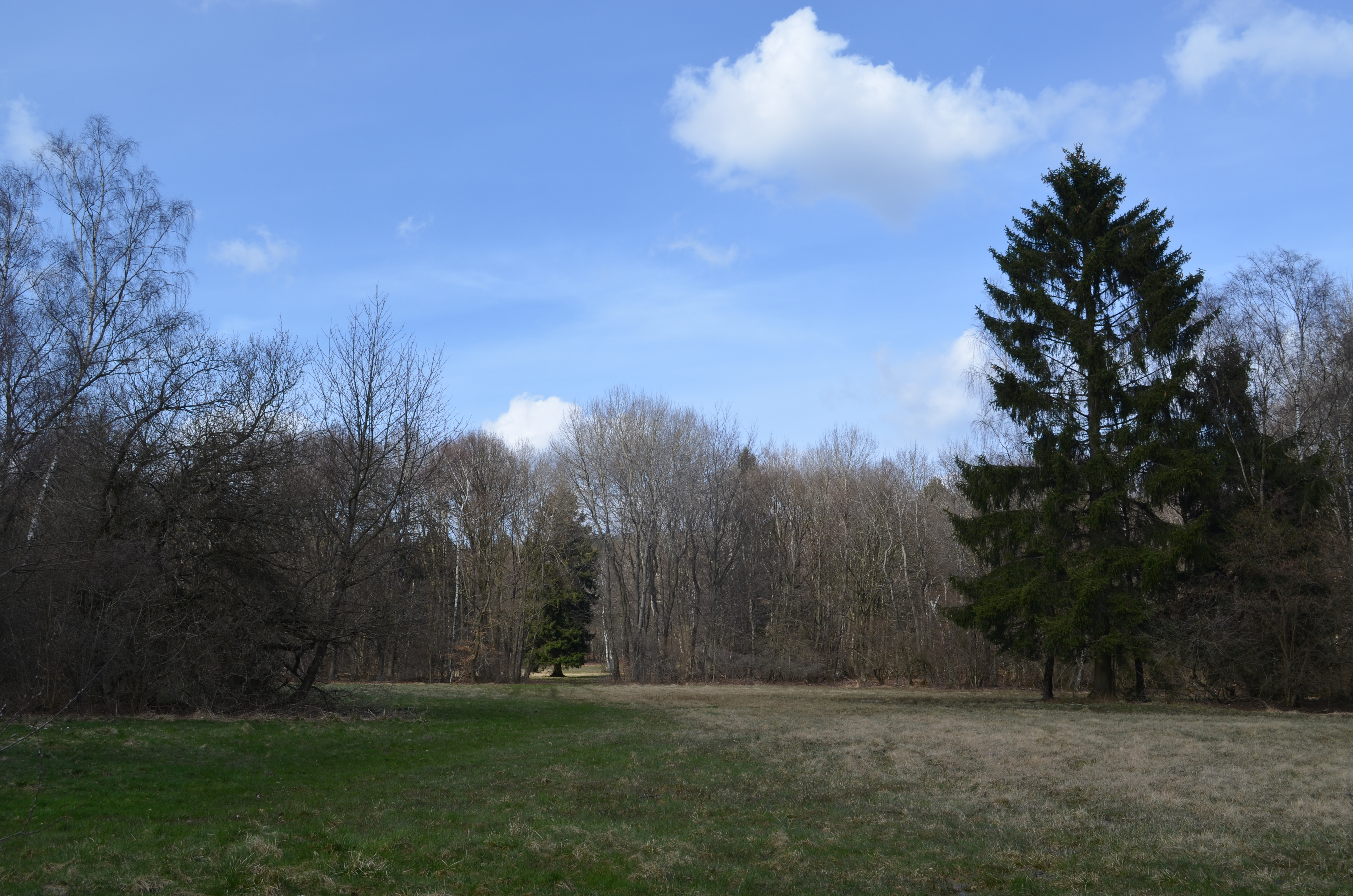 Königstein, Schmittröder Wiesen